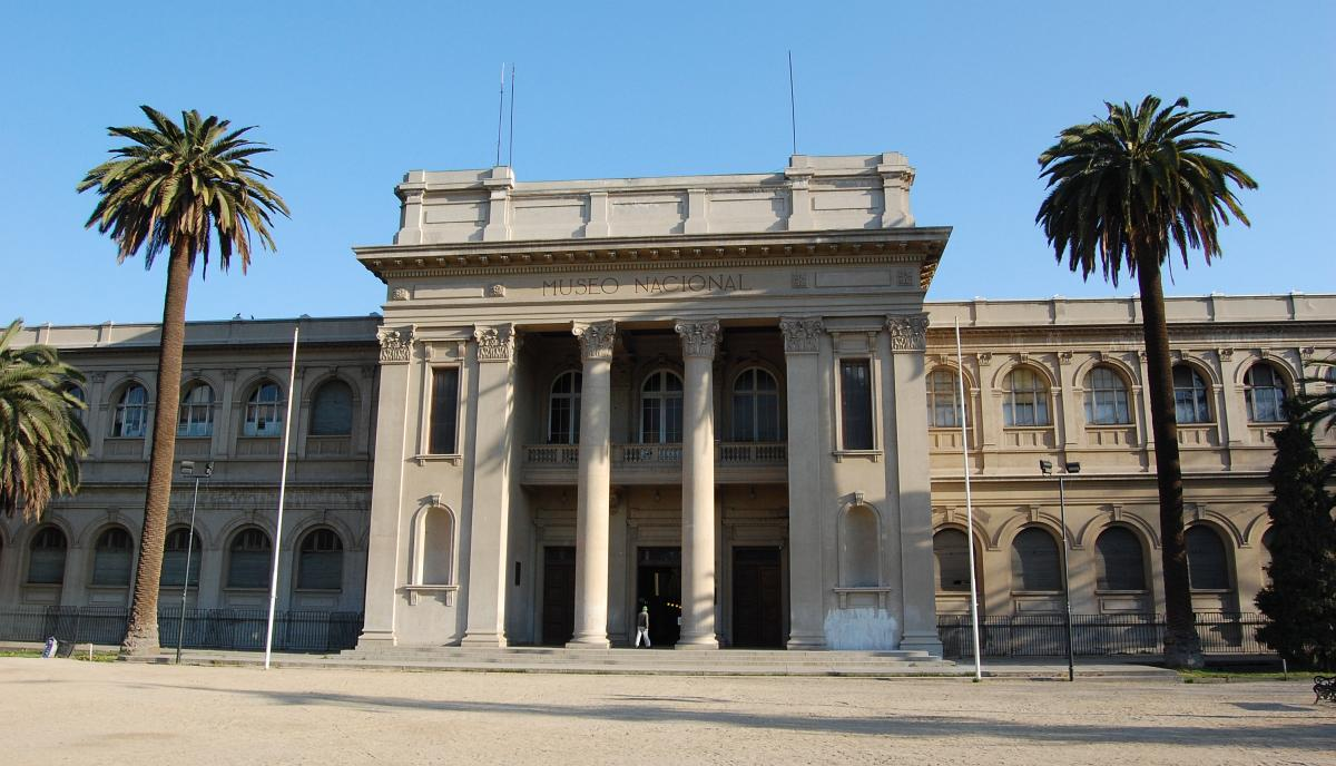 Vista frontal del Museo Nacional de Historia Natural de Chile. Quinta Normal, Santiago de Chile.